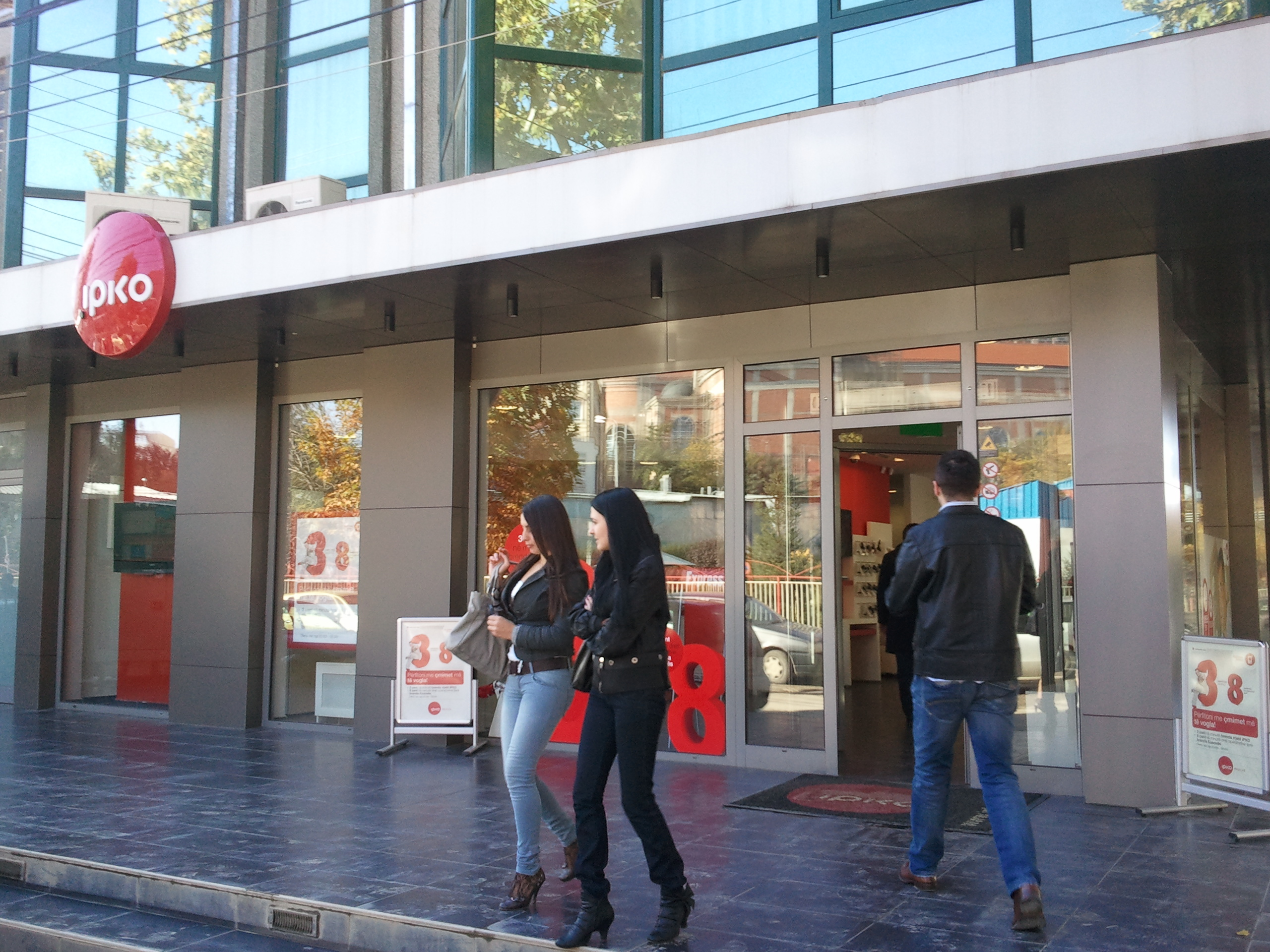 IPKO-Filiale in Prishtina am Tag